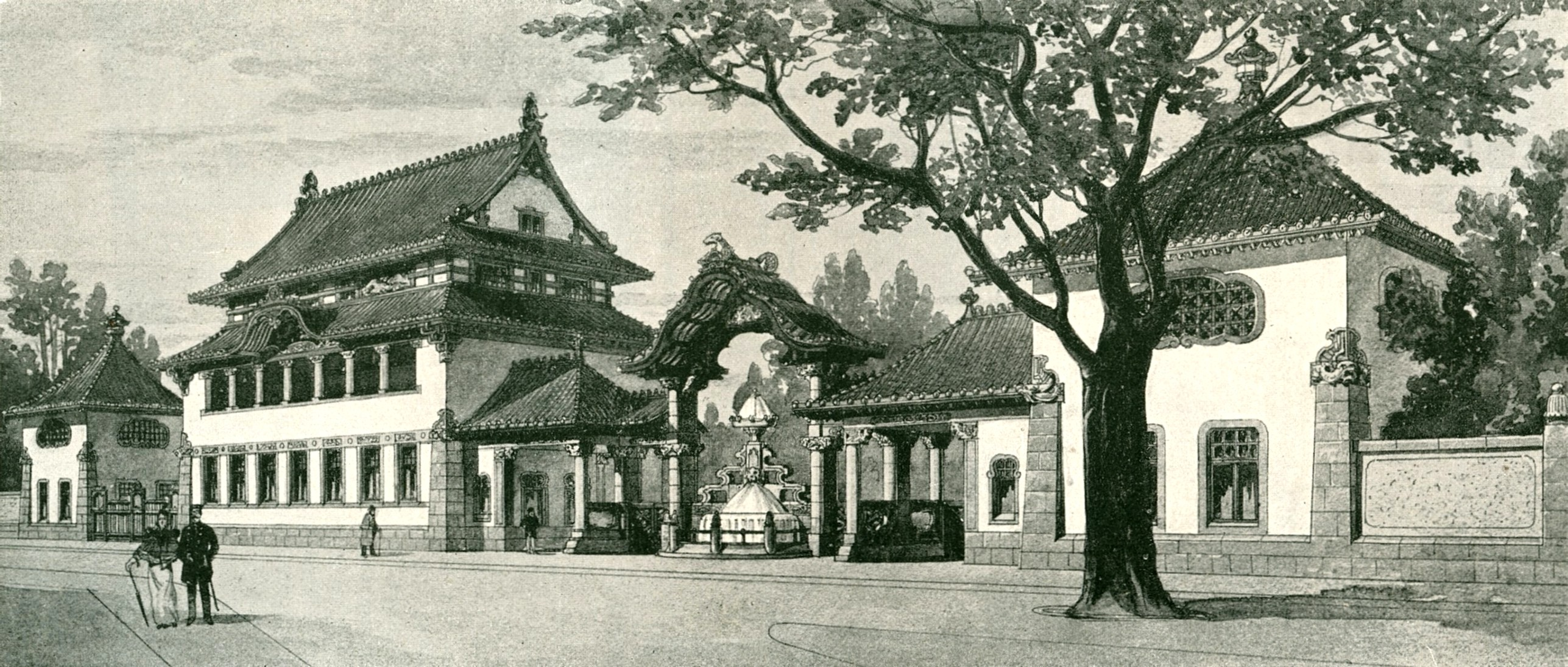 Entwurf für den Haupteingang des Zoologischen Gartens Berlin